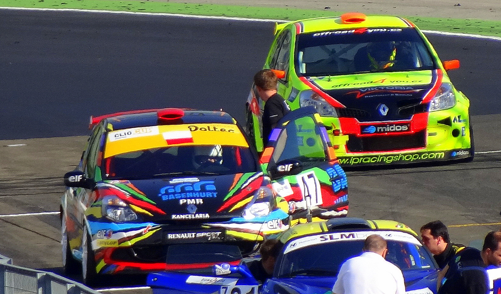 Renault Clio